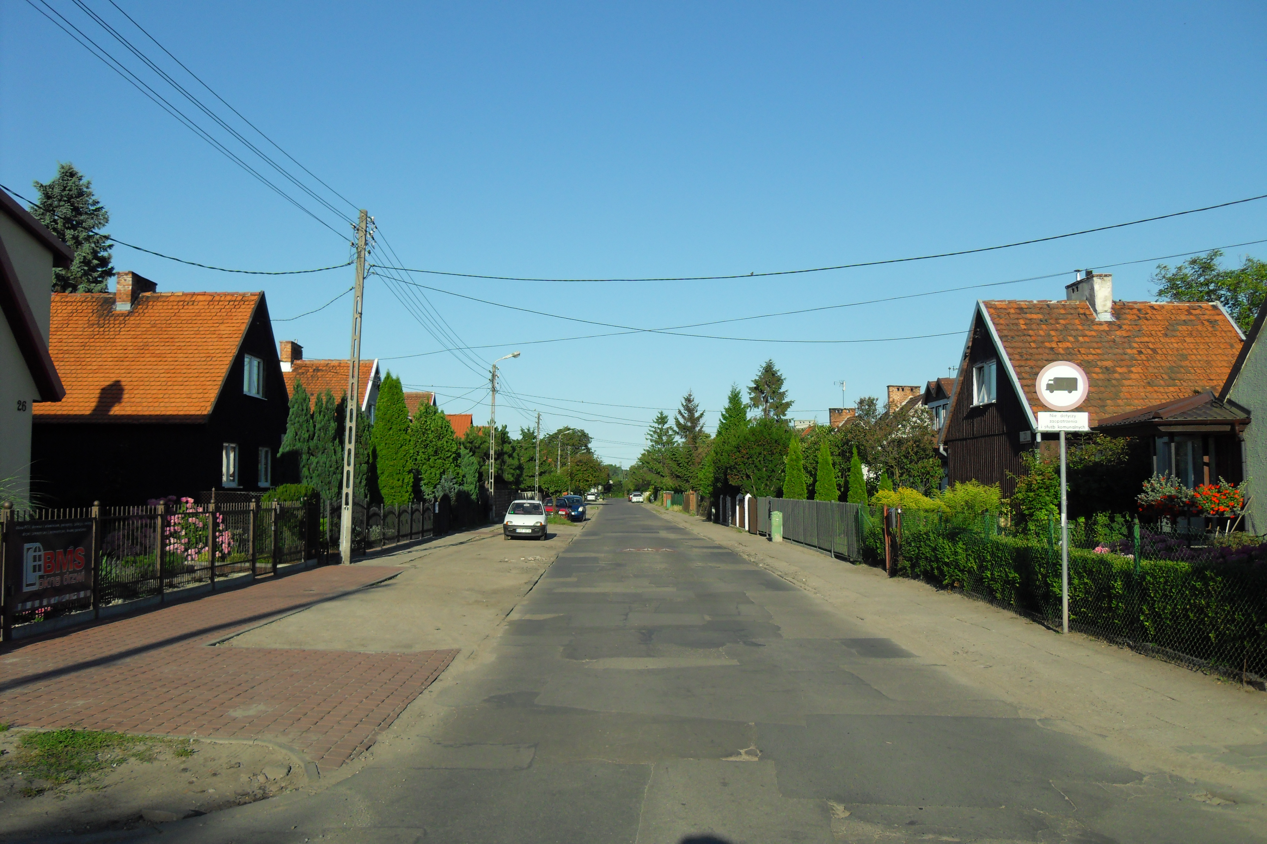 Gdańsk Wrzeszcz Dolny, ul. Pstrowskiego.